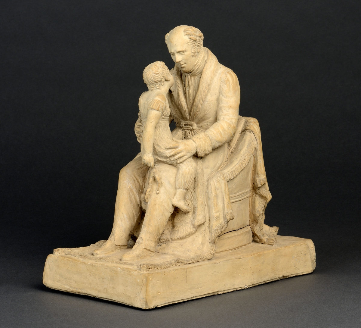 Sculpture Homme tenant une fillette sur ses genoux